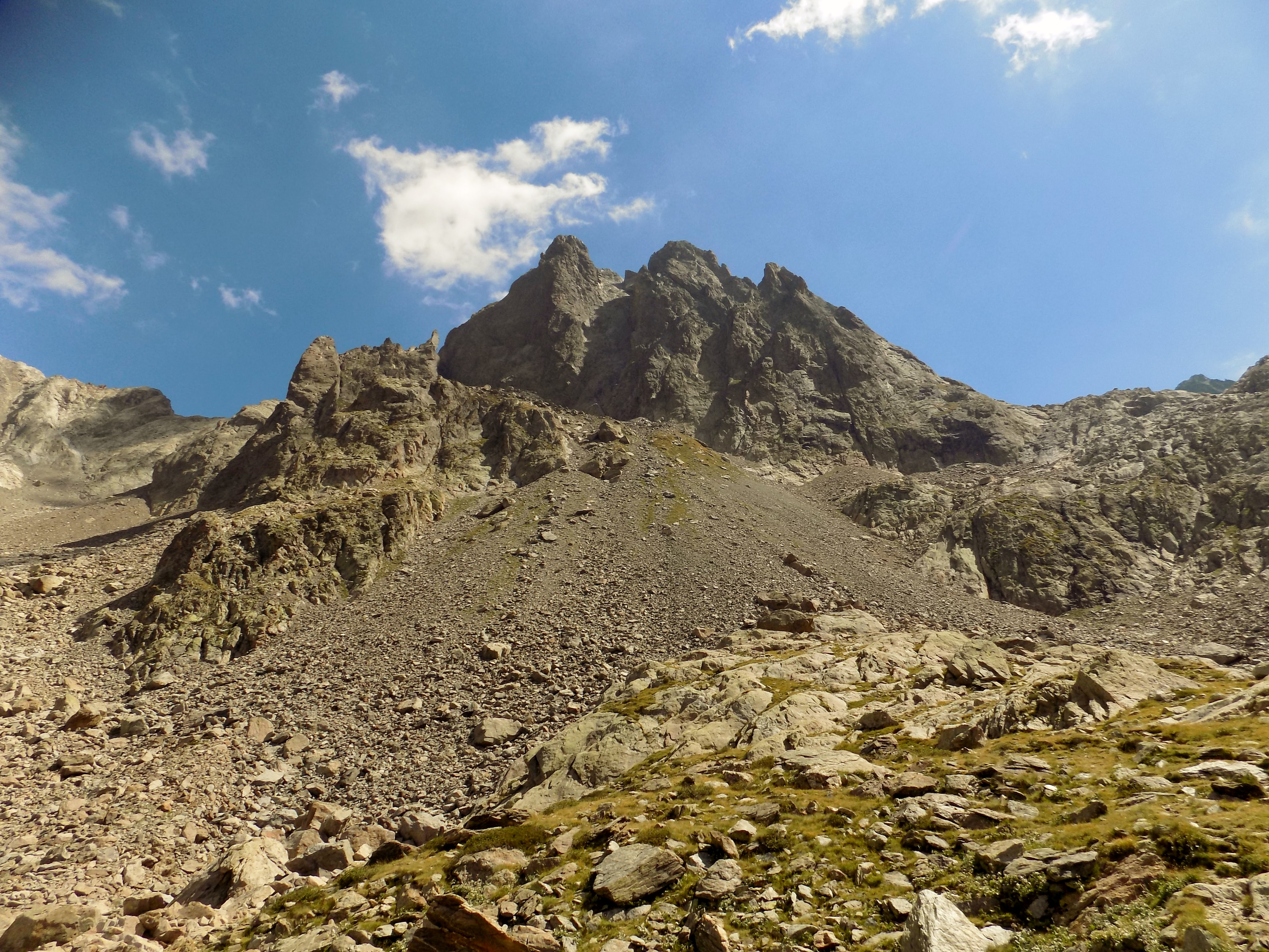 Alpi Marittime (Q47091959)